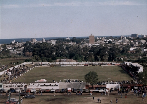 Imágen mientras se disputa un partido de Basáñez en La Bombonera.